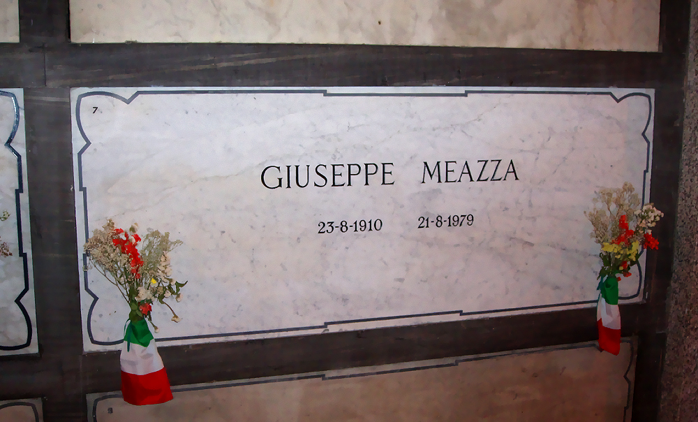 Tablica pamiątkowa poświęcona pamięci Giuseppe Meazzy - gracza Milanu i Interu. Giuseppe Meazza memorial board.